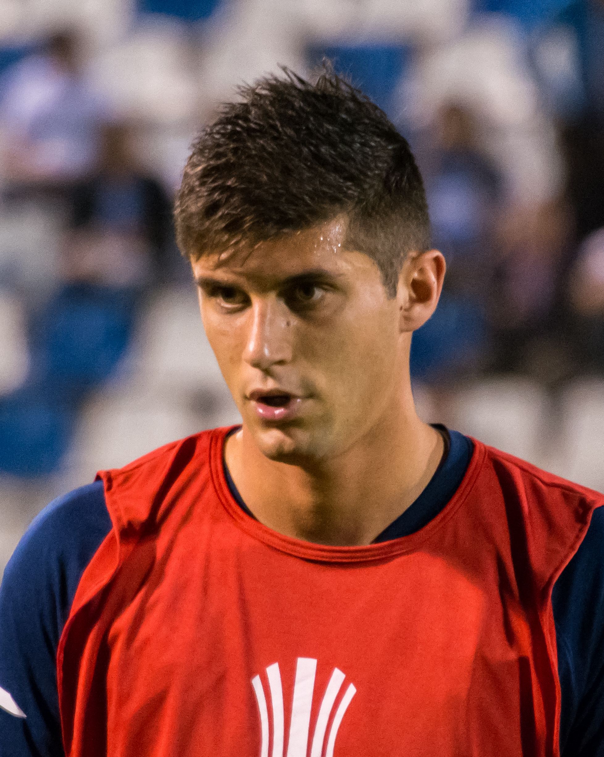 Benjamín Kuscevic, Universidad Católica v Rosario Central, Estadio San Carlos de Apoquindo, Las Condes, Santiago, Chile.